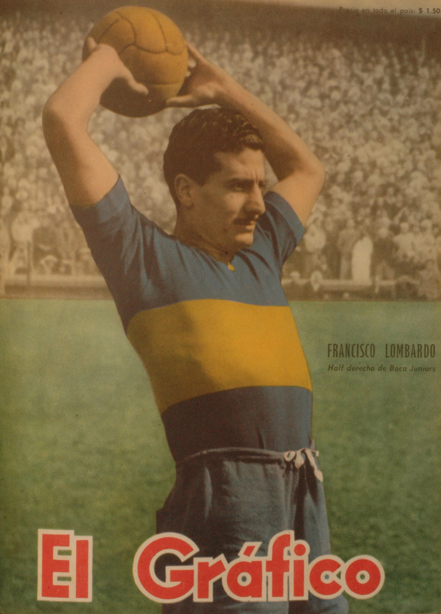 El Grafico del 24 de Octubre de 1952. Edicion 1733